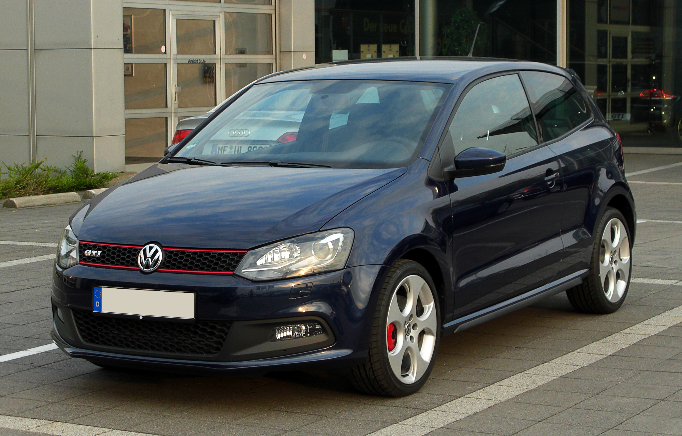 VW Polo GTI (V)